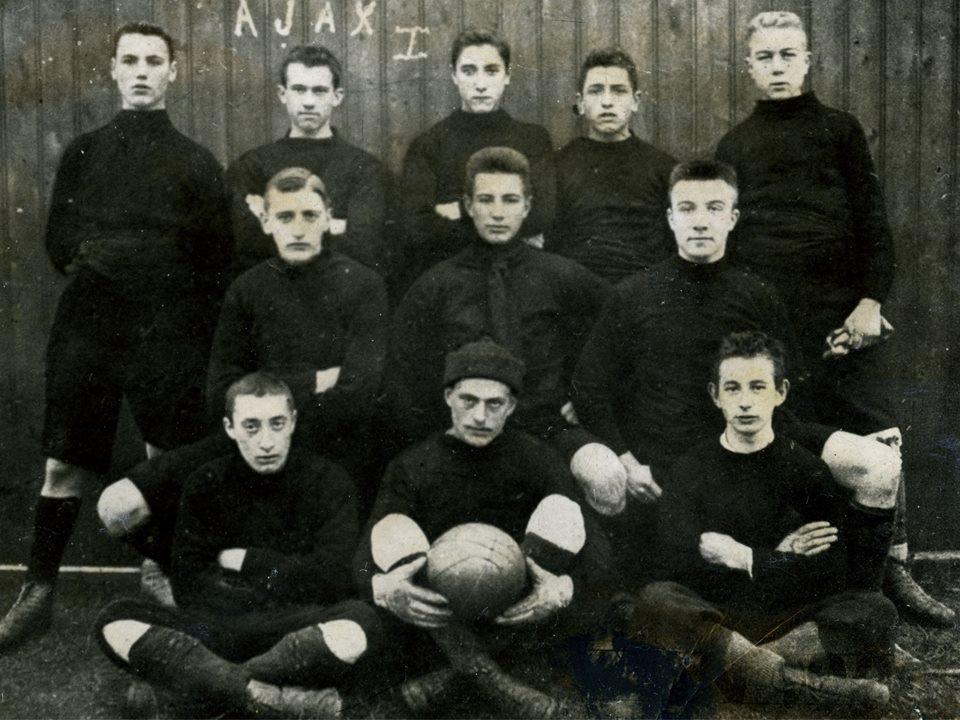 Het eerste Ajax-elftal, voor het seizoen 1900-1901.Vlnr. boven: Franciscus Hendricus (Frans) Pasteuning, Johannes Bote Geisler, Hermann Stallmann, Martaré, Ad van der Laan; Vlnr. midden: Hein Brockmann, Chris Holst, Christiaan Gerardus (Chris) Hertel; Vlnr. onder: Bernard Elias Harbord, Cor Kist, Robertus (Ro) Dijkstra.